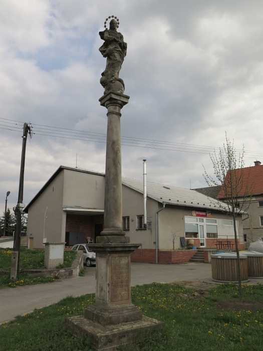 Sloup se sochou P. Marie (Benkov), náves, Benkov, Benkov (Uničov).